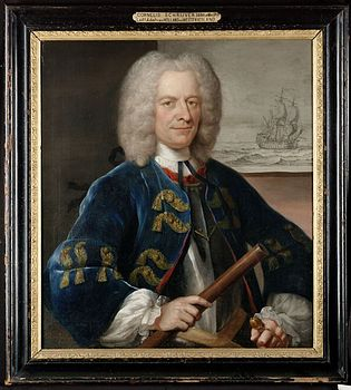 Collectie, Westfries Museum, Inventarisnummer 01781 Materiaal vlas, hout, olieverf Beginjaar 1736 schilder Quinkhard, Jan Maurits Schrijver, Cornelis